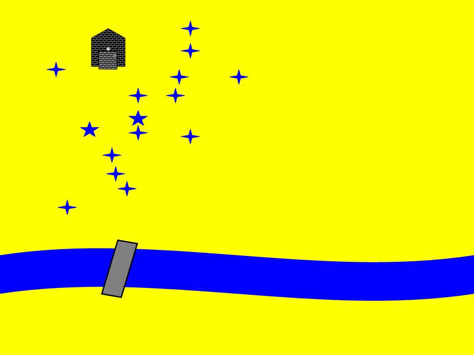 bandera no oficial